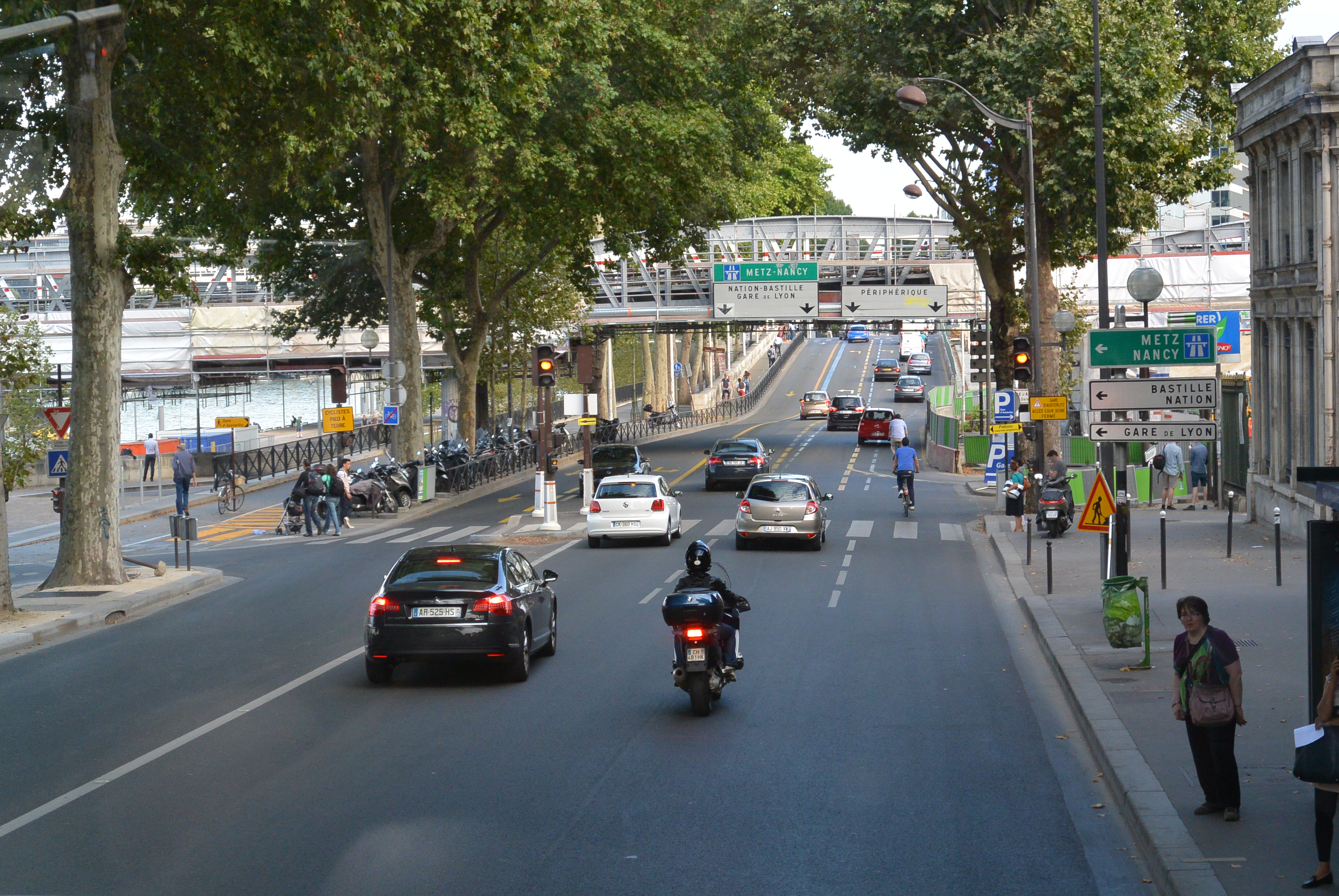 Quai d'Austerlitz, Paris.